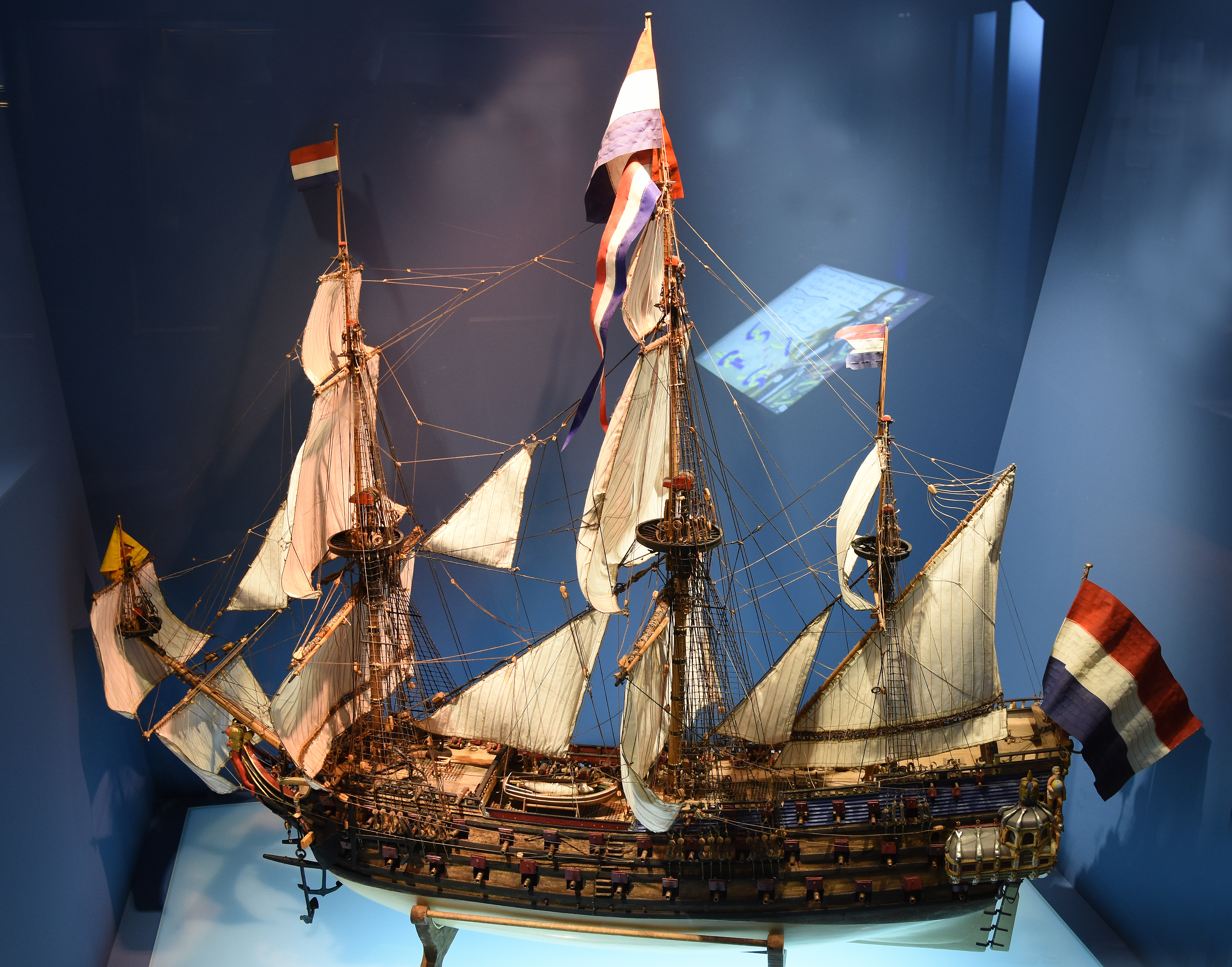 Model "Zeven Provinciën", Zeeuws maritiem muzeeum, Vlissingen, NL